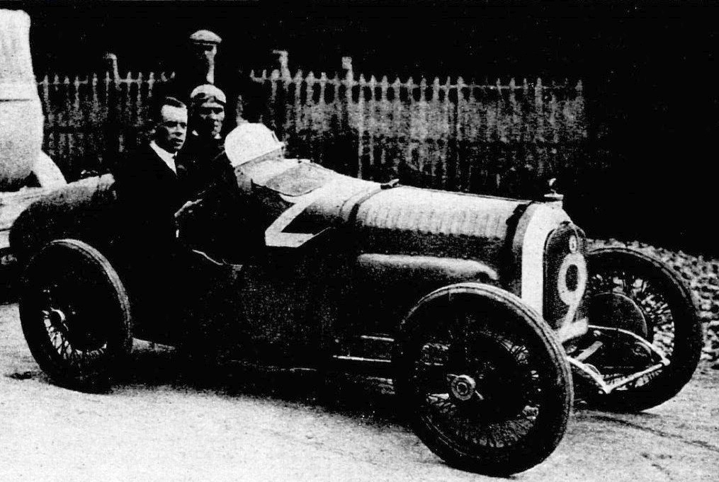 Kenelm Lee Guinness gagnant de la Coupe des Voiturettes 1922 au Mans, sur Talbot-Darracq 56 2 (Le Monde Illustré du 23 septembre 1922, p.261)